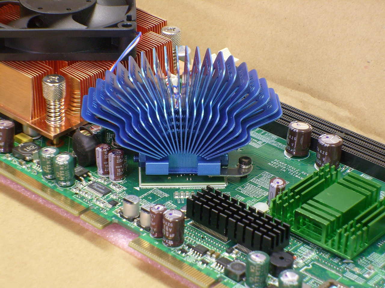 Verschiedene Kühlkörper auf einer Slot-CPU-Karte